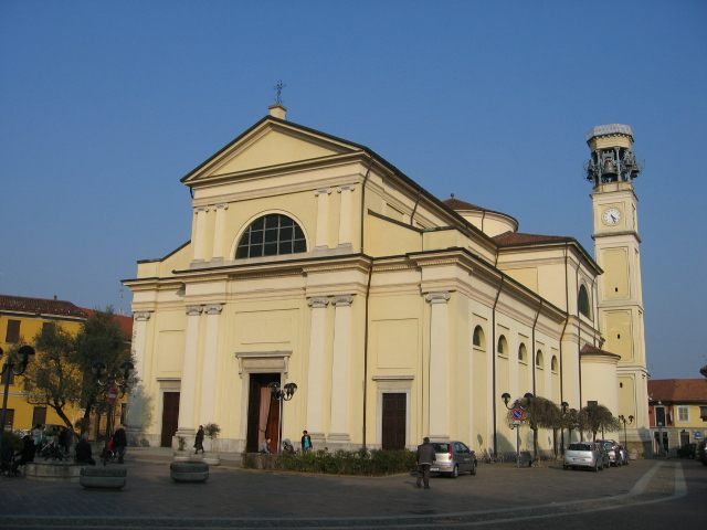 chiesa di San Bartolomeo vista da Piazza Roma